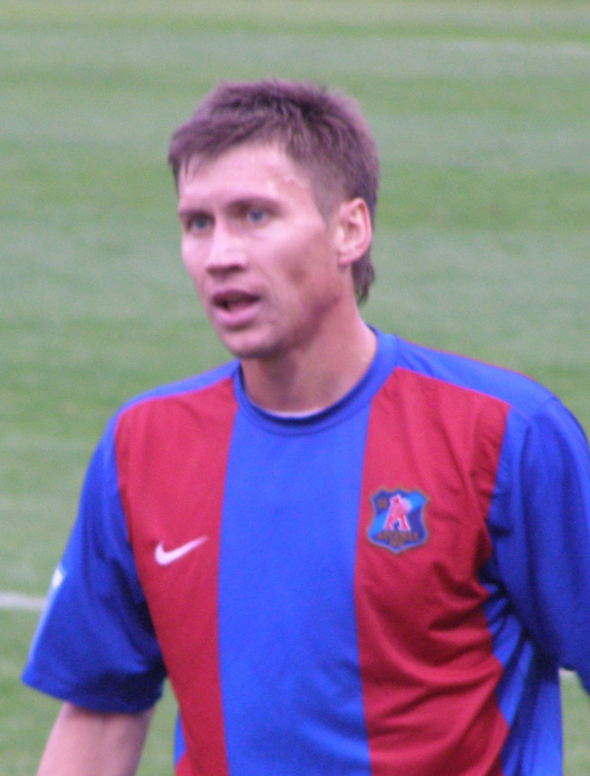 Ukrainischer Fußballspieler Serhij Symonenko während dem Spiel zwischen Arsenal Kyjiw und Metalist Charkiw